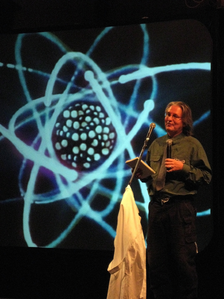 Bruce Sterling opent GogBot 2009